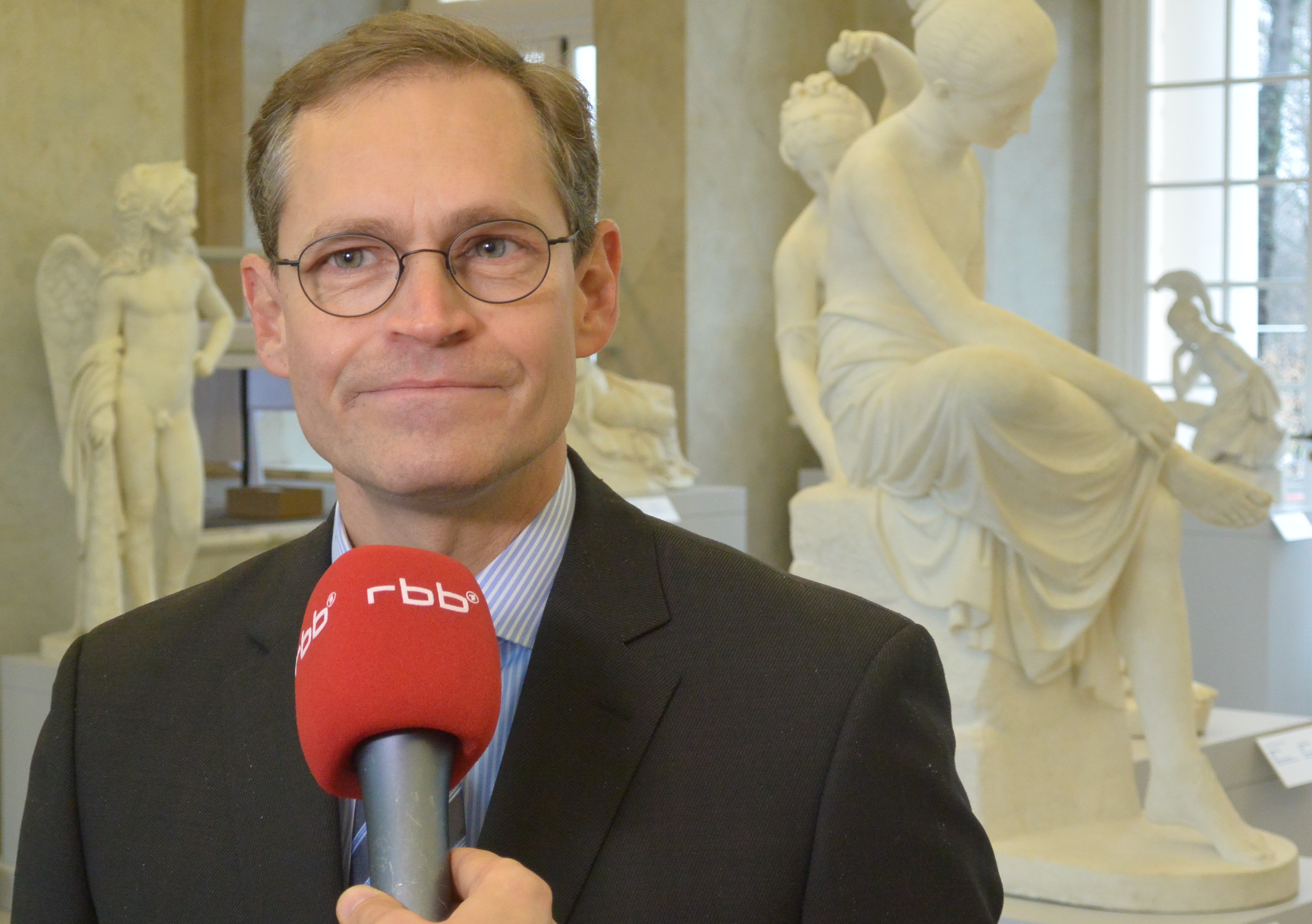 Michael Müller beim ersten öffentlichen Termin als Regierender Bürgermeister von Berlin, anlässlich der Pressekonferenz zur Wiedereröffnung des Neuen Flügels auf der Ostseite von Schloss Charlottenburg.